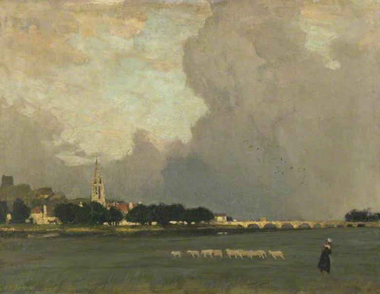 óleo sobre lienzo - 71 cm. x 92 cm. - Lakeland Arts Trust